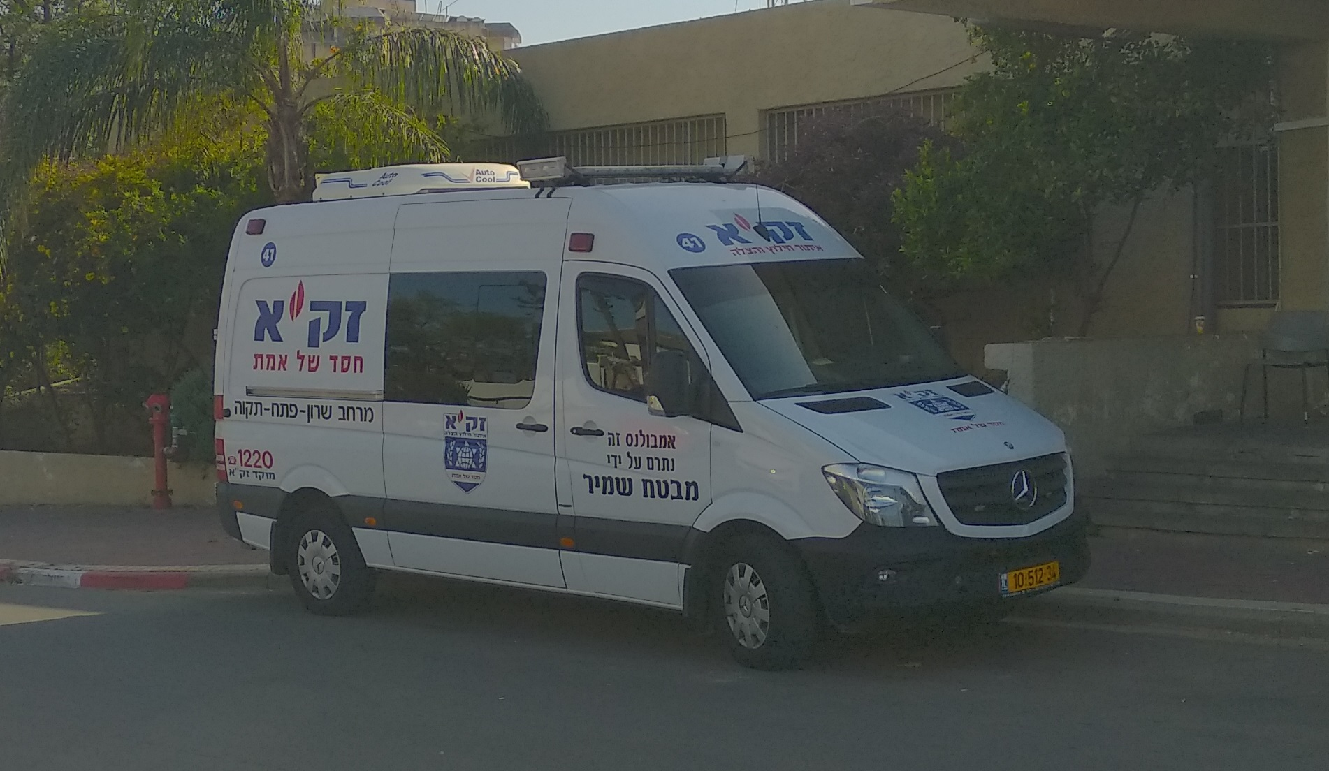 אמבולנס של זק"א